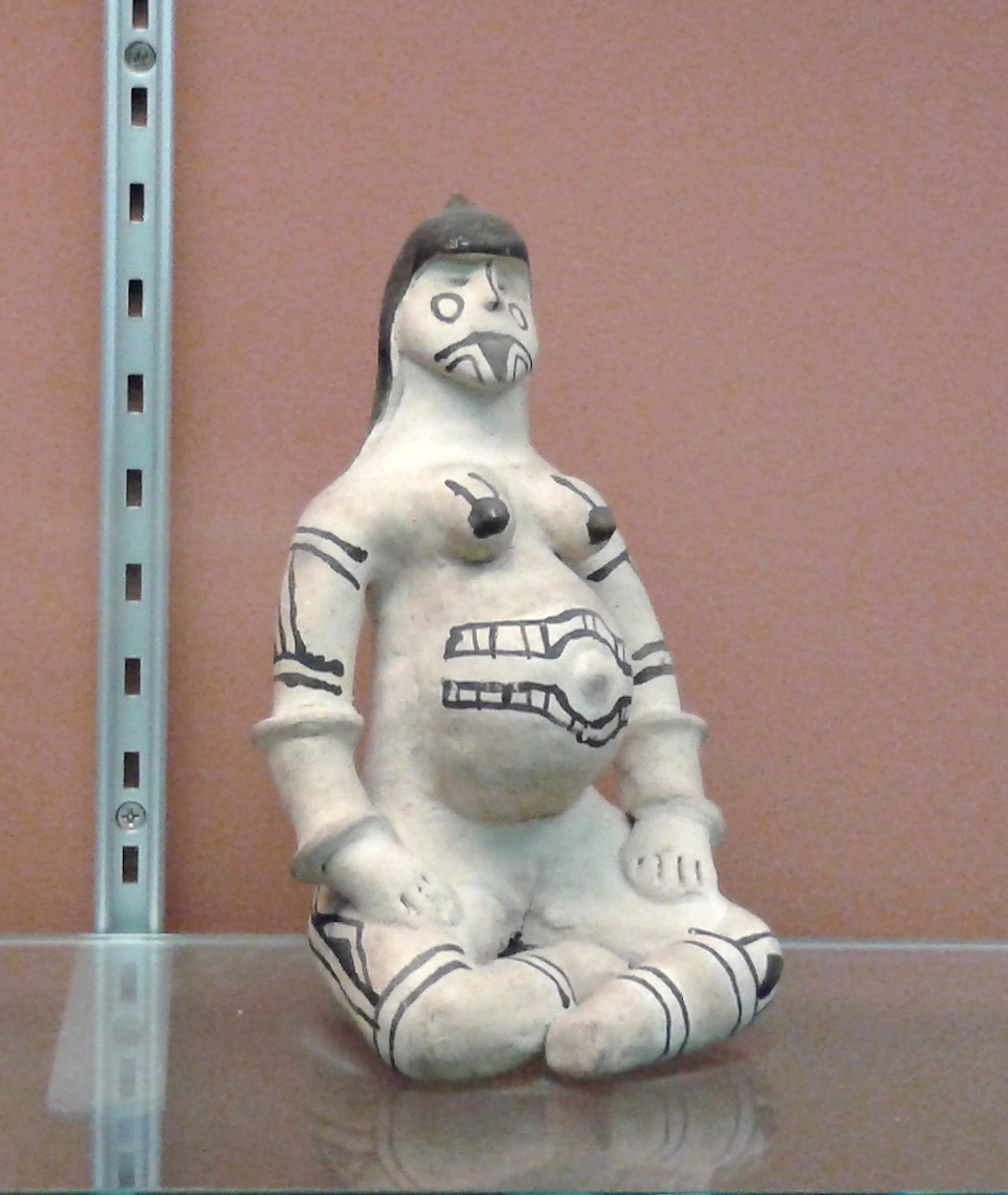 Boneca Karajá, cerâmica policromada. Acervo de etnologia indígena brasileira do Museu Nacional/UFRJ, Rio de Janeiro, Brasil.